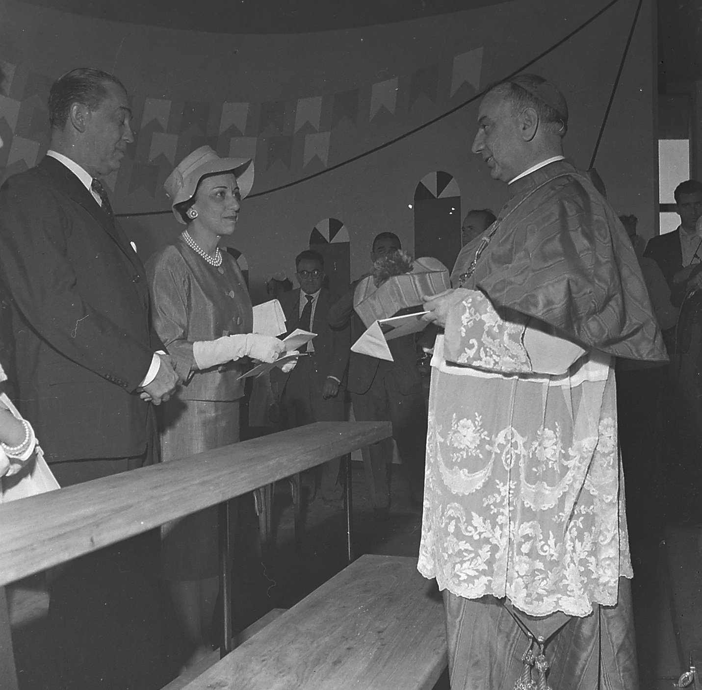 Imagem do Fundo Agência Nacional, do Arquivo Nacional